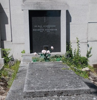 Grab Max Schönherr-Helenenfriedhof Baden